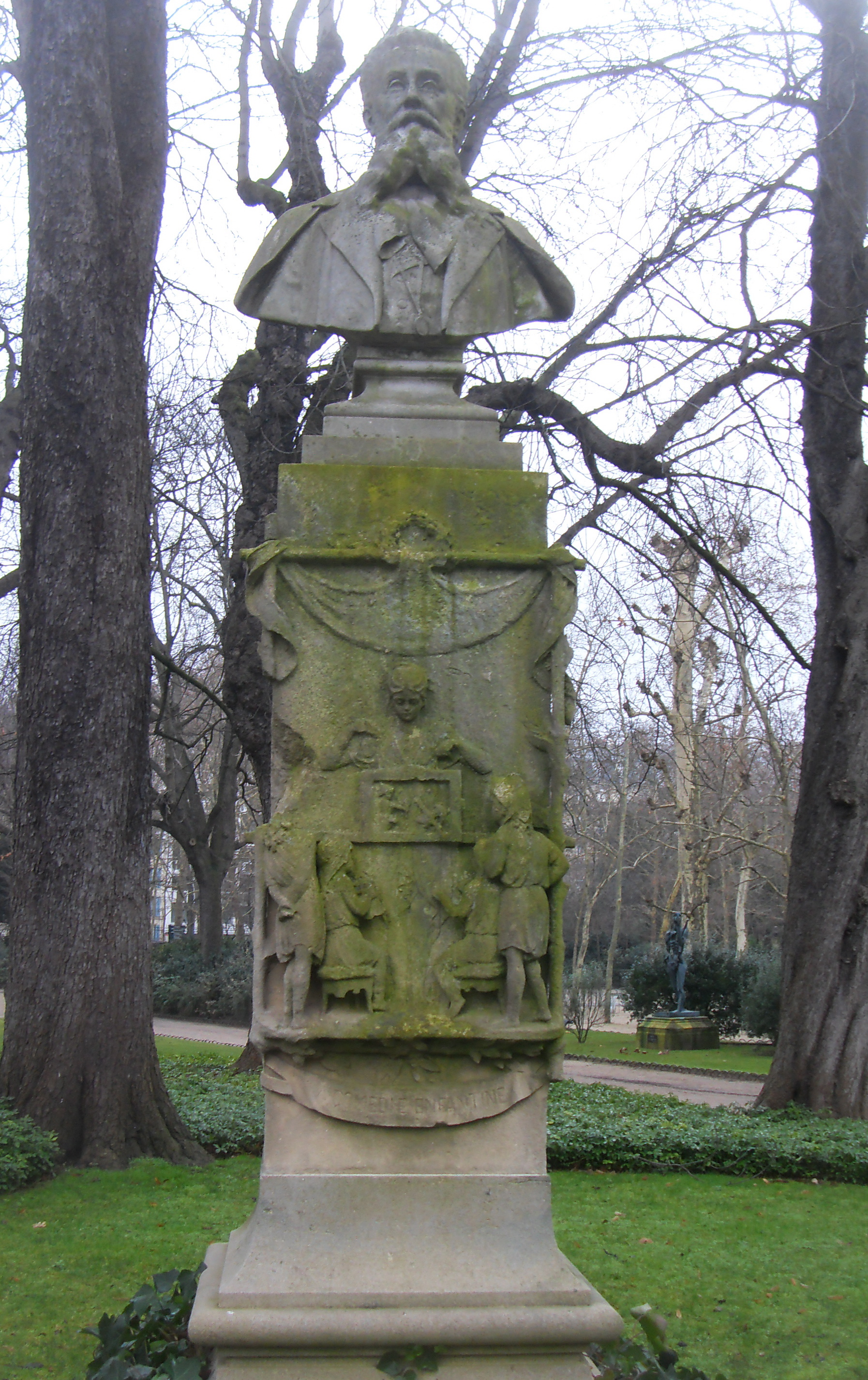 Buste de Louis Ratisbonne